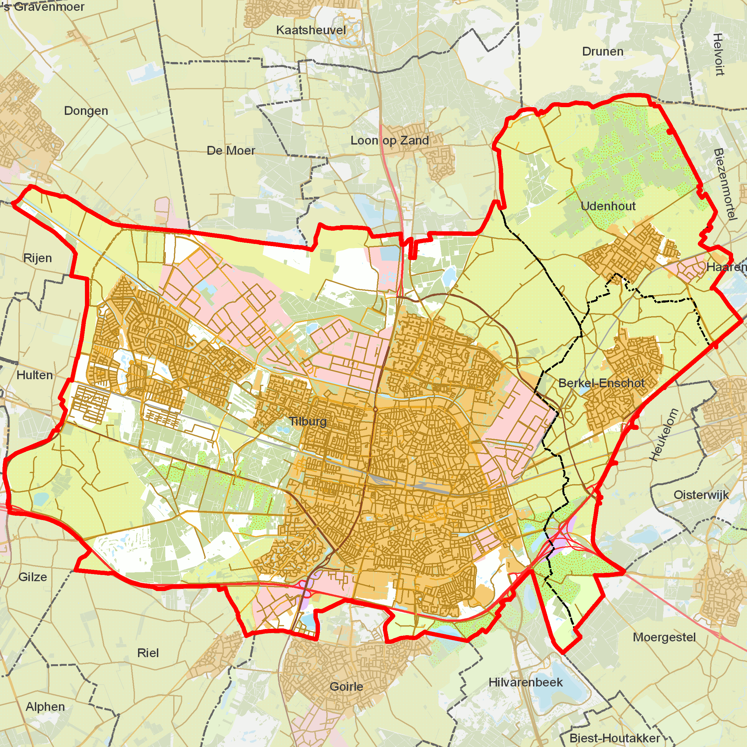 BAG woonplaatsen - Gemeente Tilburg.png